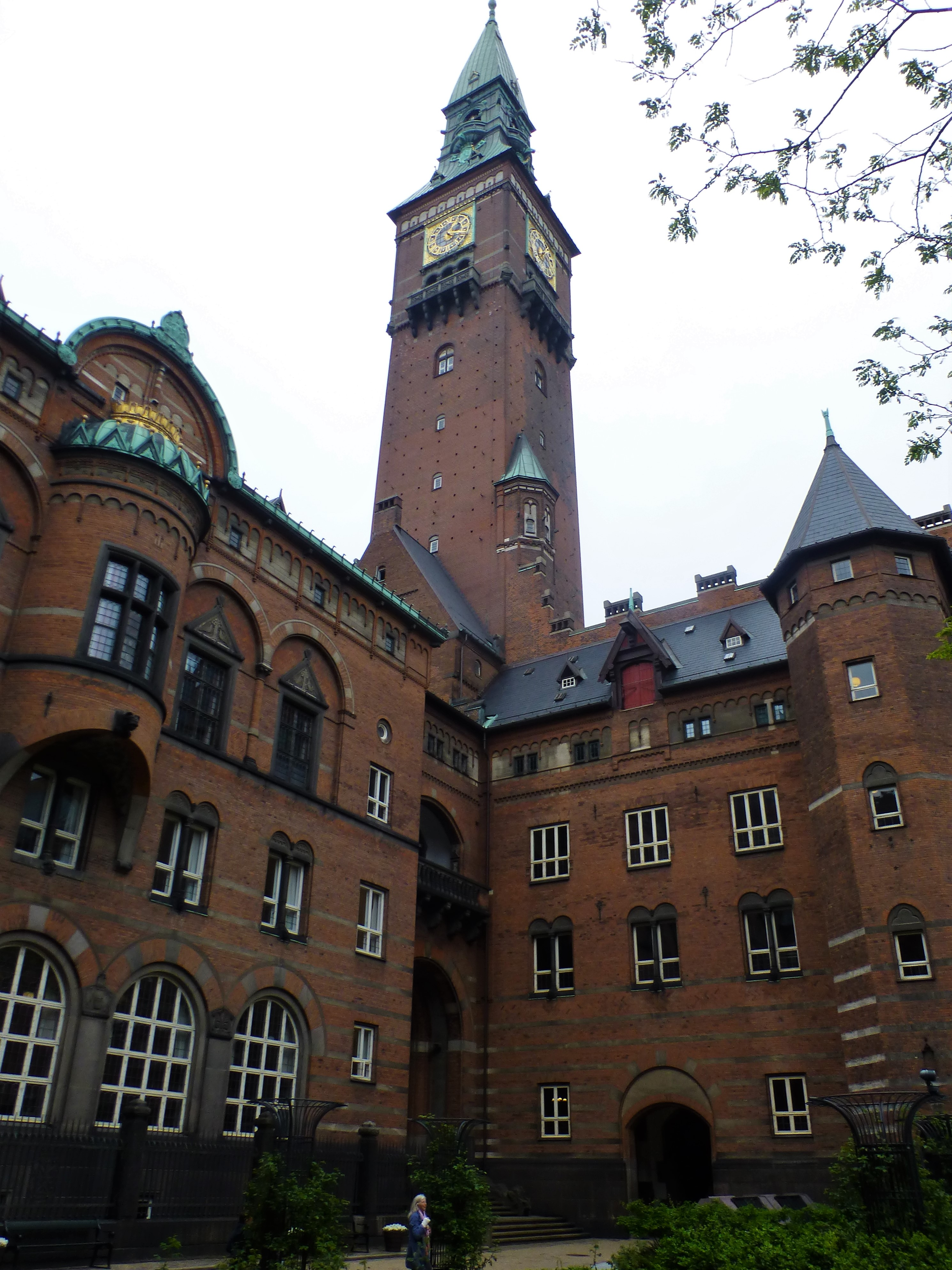 Rådhusårnet set fra Rådhushaven